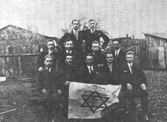 החלוץ